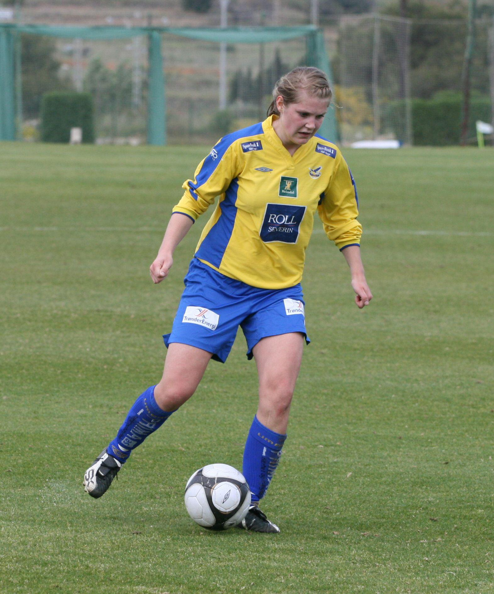 Fotballspilleren Inger Ane Hole